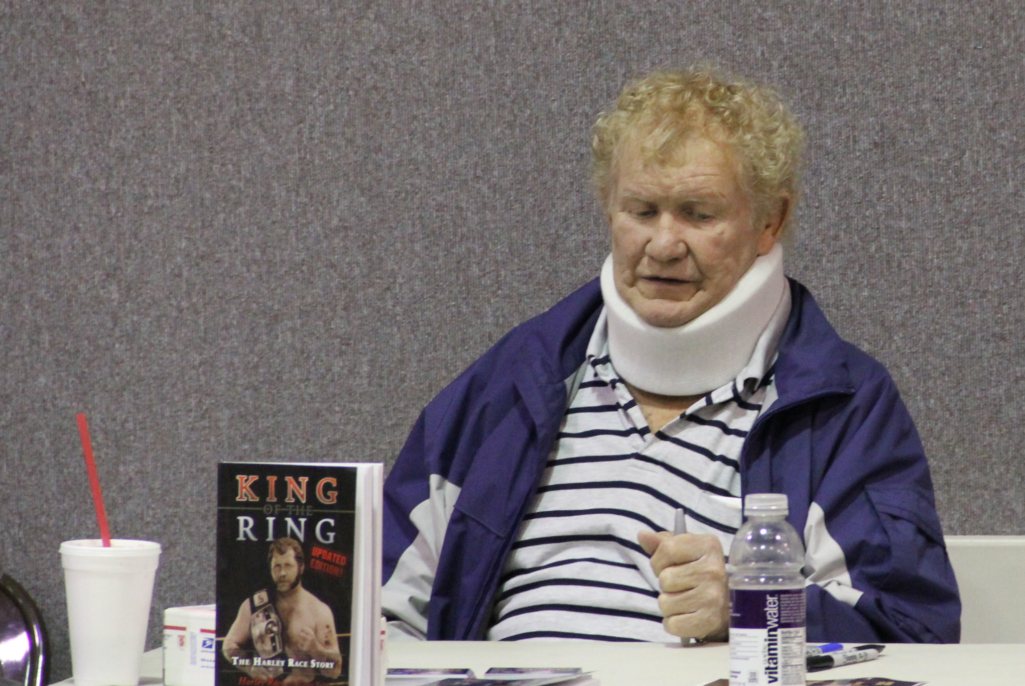 Le catcheur Harley Race en 2013